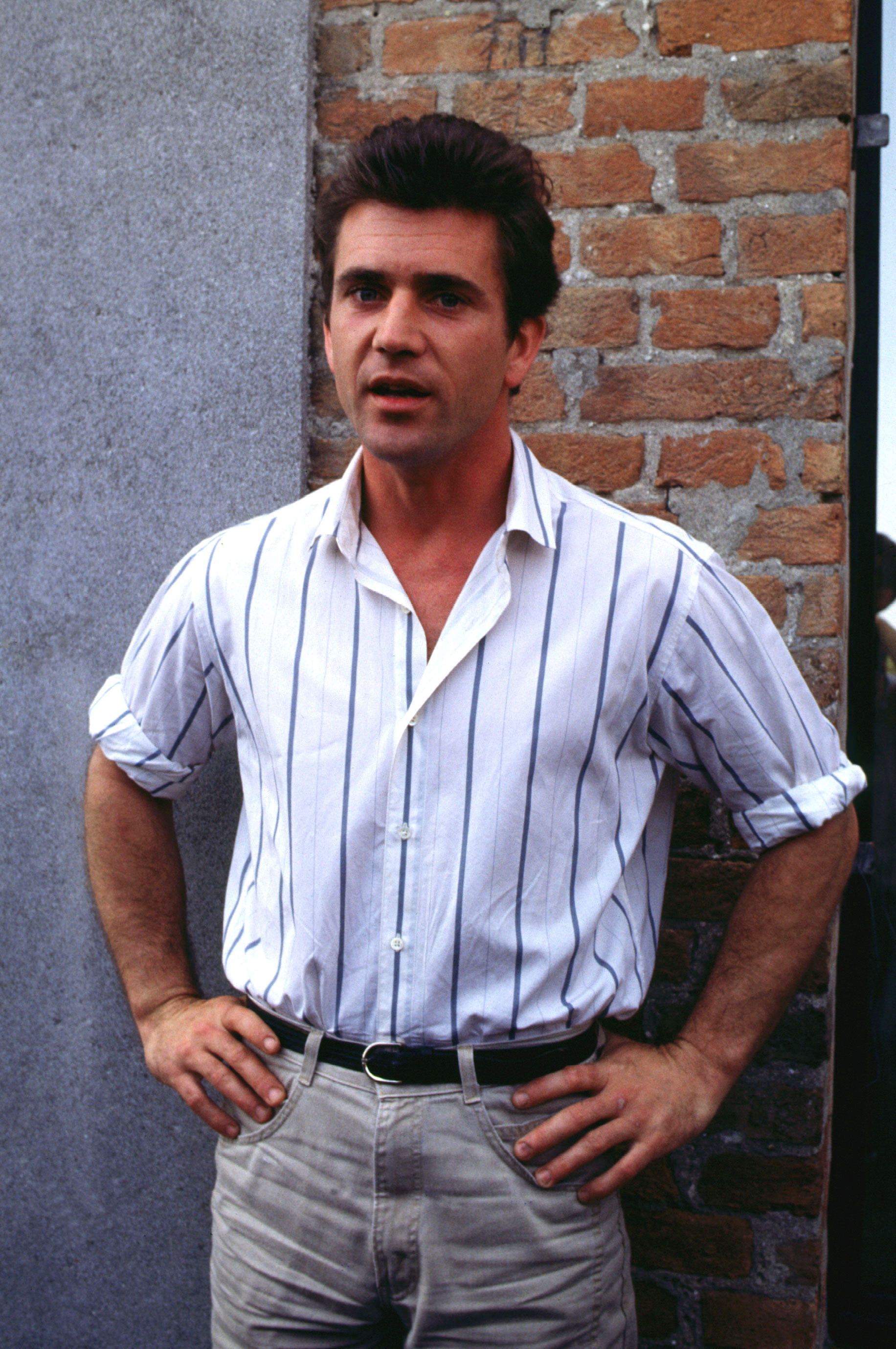 L'attore Mel Gibson alla Mostra del cinema di Venezia del 1985